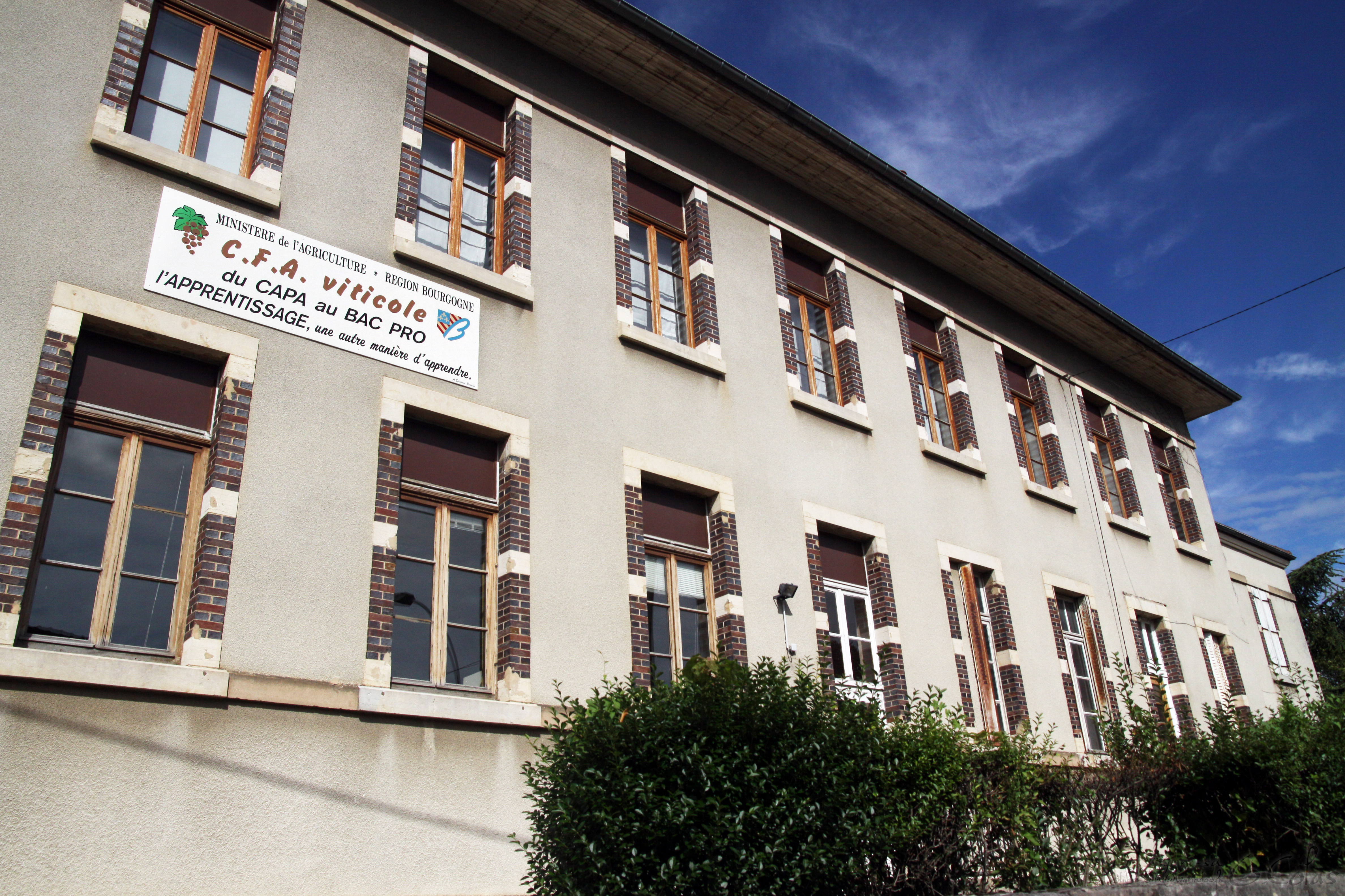 La Viti de Beaune, Batiment du CFA